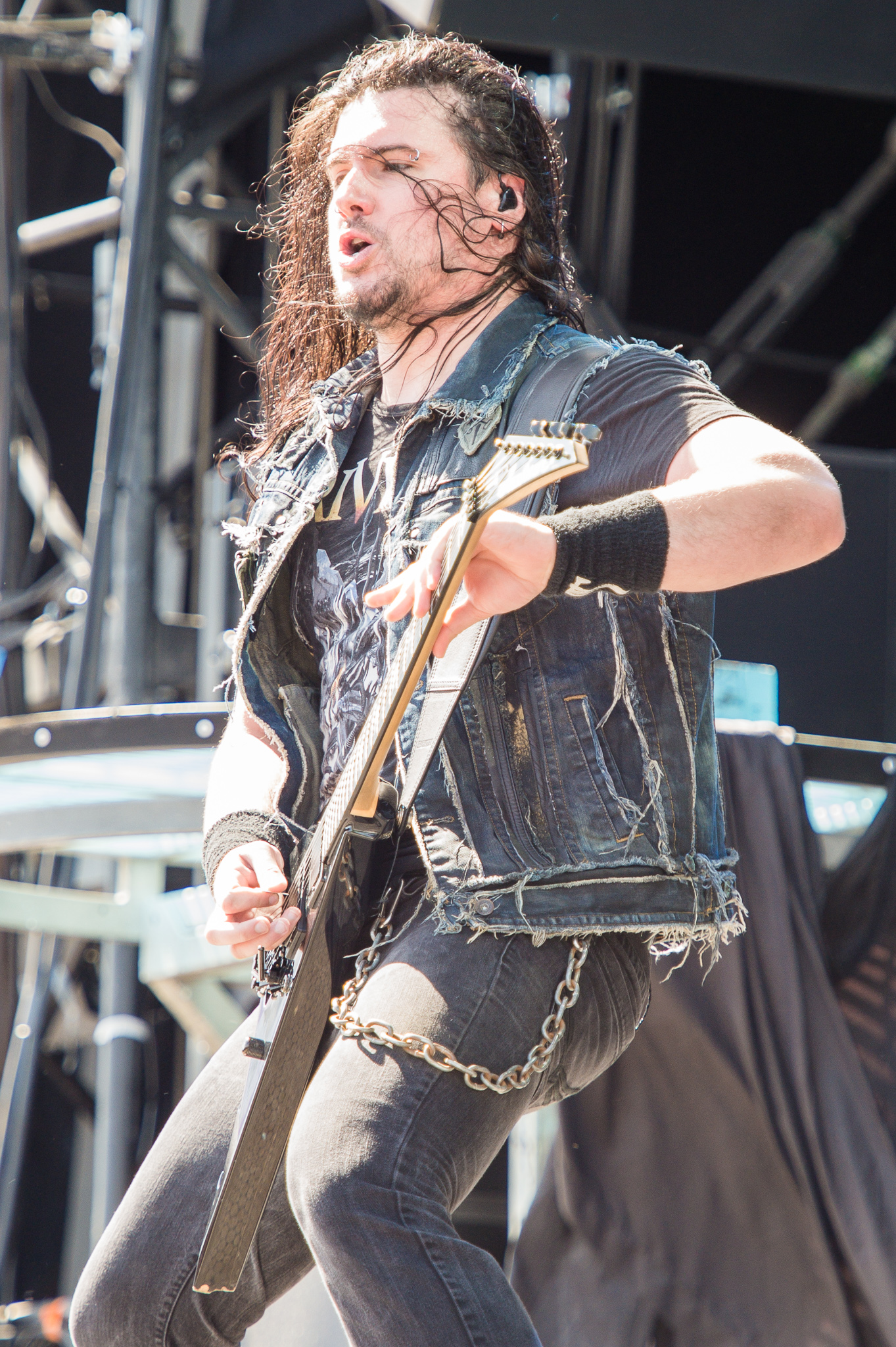 ARGO-Konzerte,Centerstage,Corey Beaulieu,Konzert,Livekonzert,Livemusik,Musik,RiP,Rock im Park 2014,Trivium